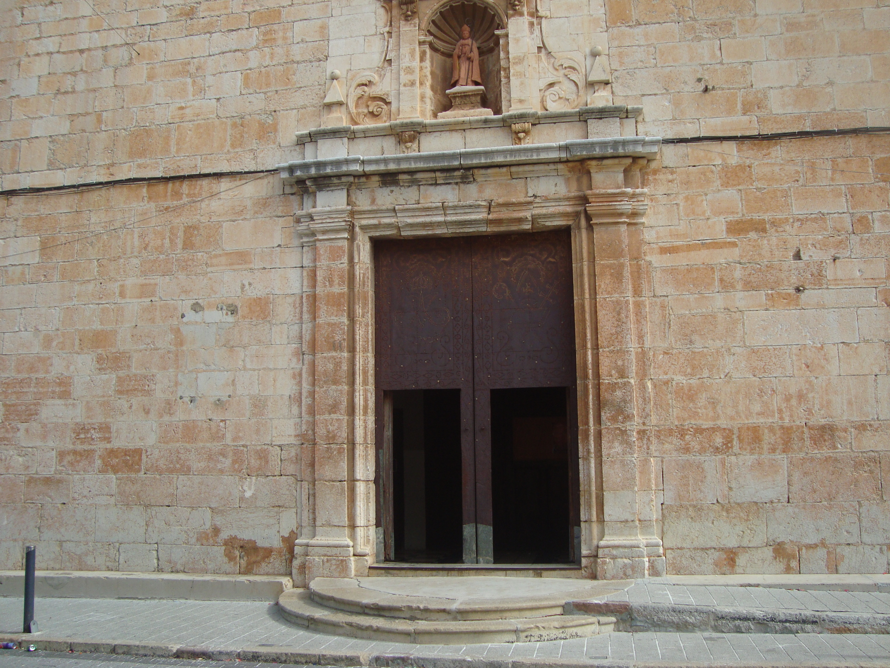 Església parroquial de la Purificació de Maria (la Salzadella) 03.098-001.